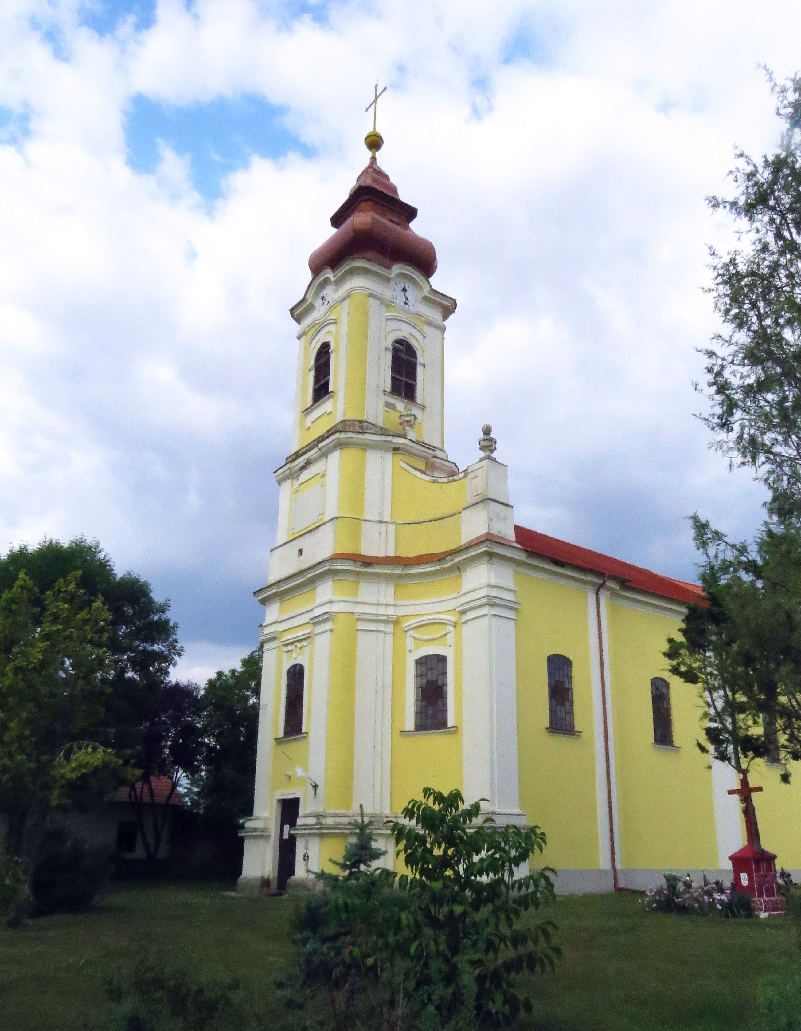 A furtai Szent László király római katolikus templom 2017-ben